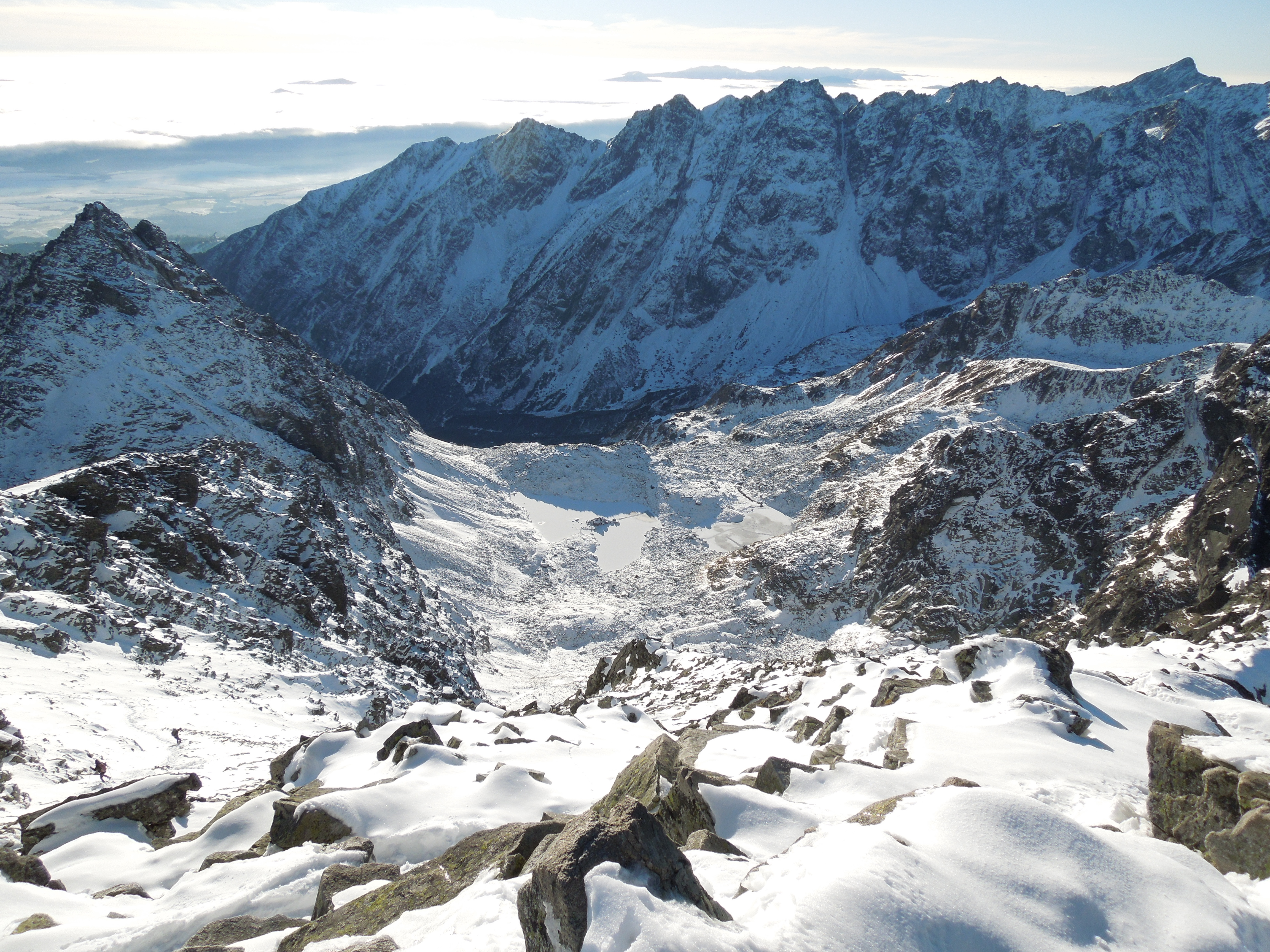 Pohľad z vrcholu Rysov do doliny Žabích plies